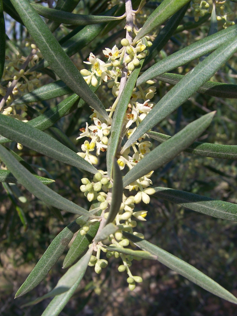 Olea europaea (Olivo) : Rama en flor - Camino de Elche, Albatera (Provincia de Alicante, España).